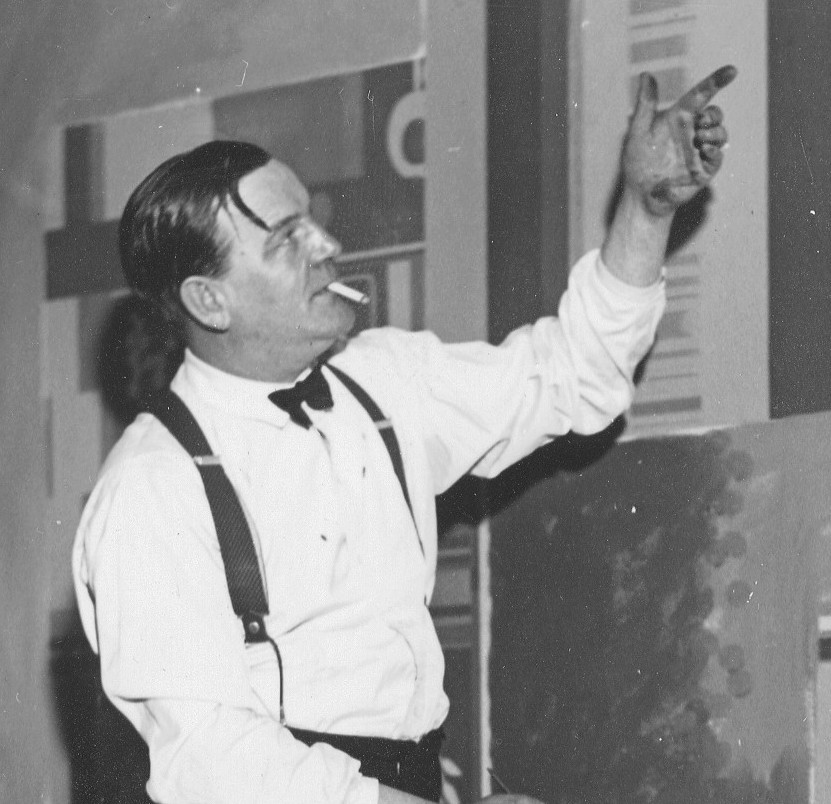 John Jon-And på KB